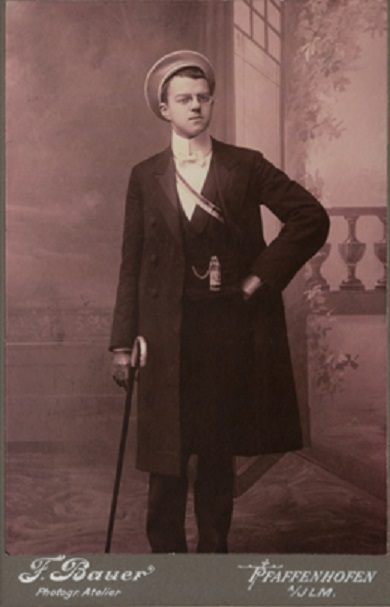 Nachlass Joseph Maria Lutz, Bildersammlung